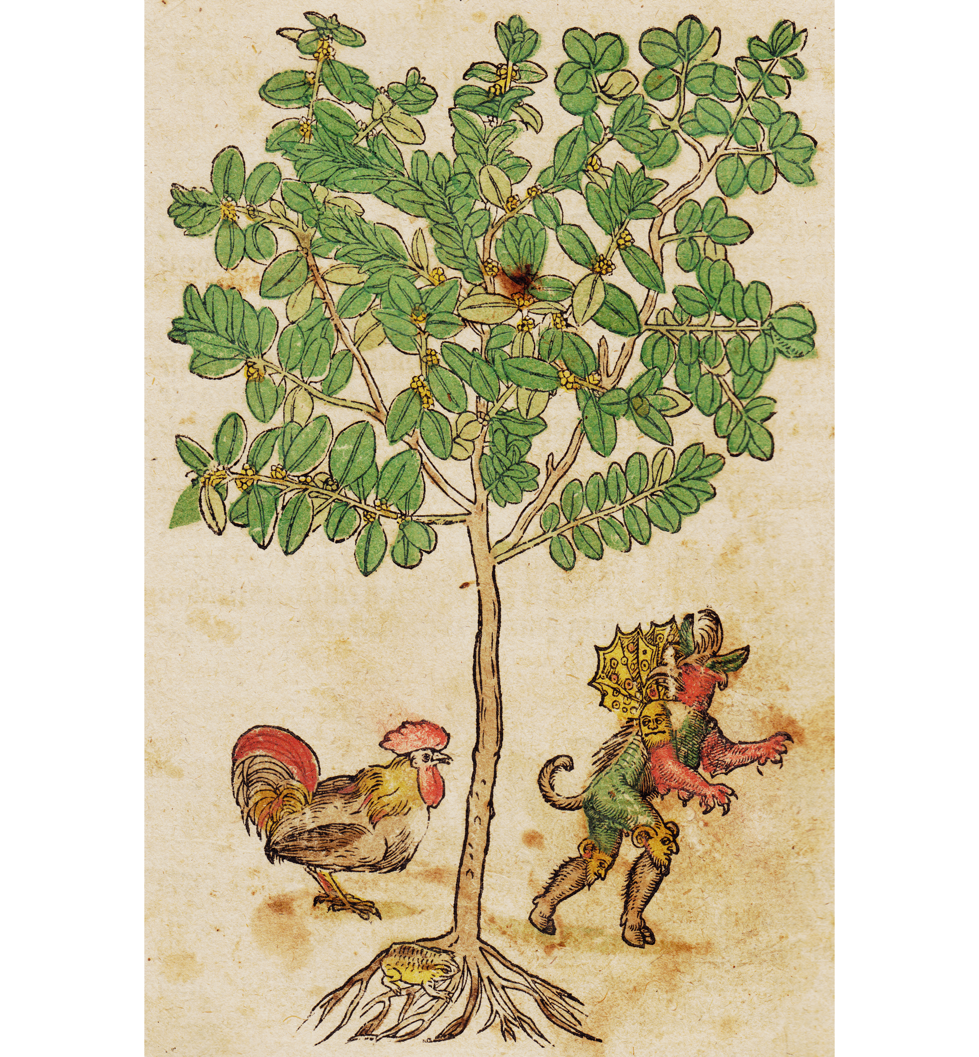 Buxbaum-Abbildung